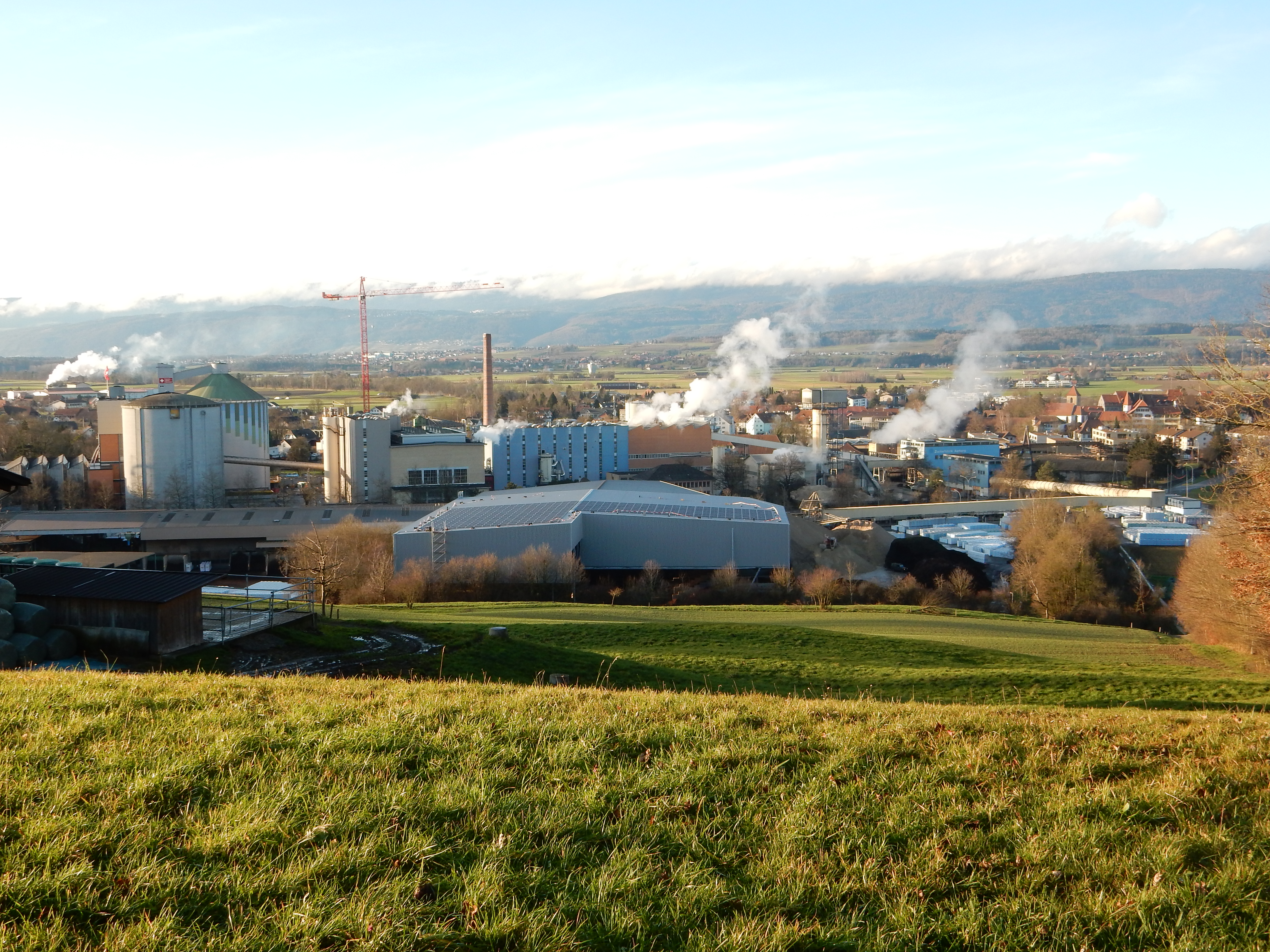 Zuckerfabrik Aarberg (Schweiz): Überblick von Südosten